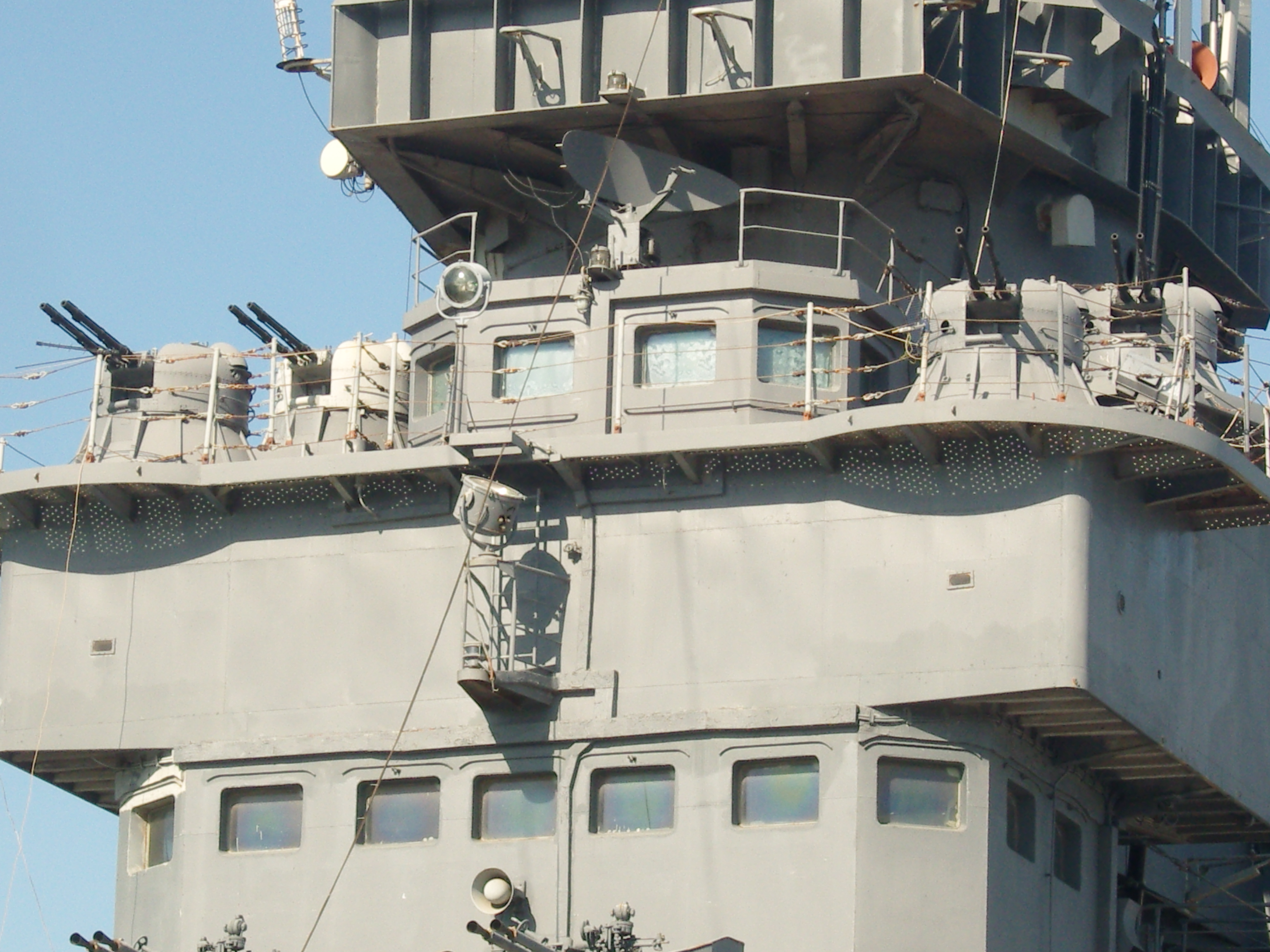 Зенитная батарея спаренных 30-мм АУ АК-230 на крейсере «Михаил Кутузов».